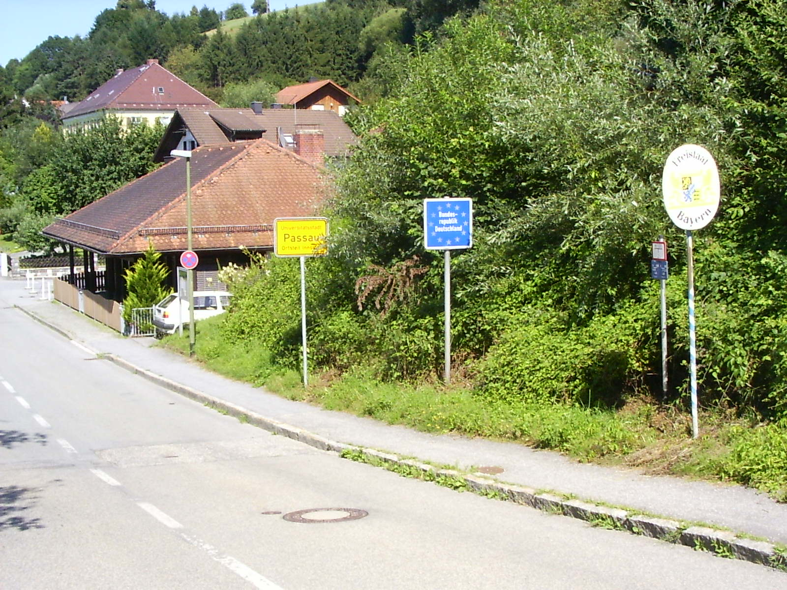 Grenze zwischen Passau (de) und Ingling (at) im Passauer Ortsteil Voglau/Innstadt